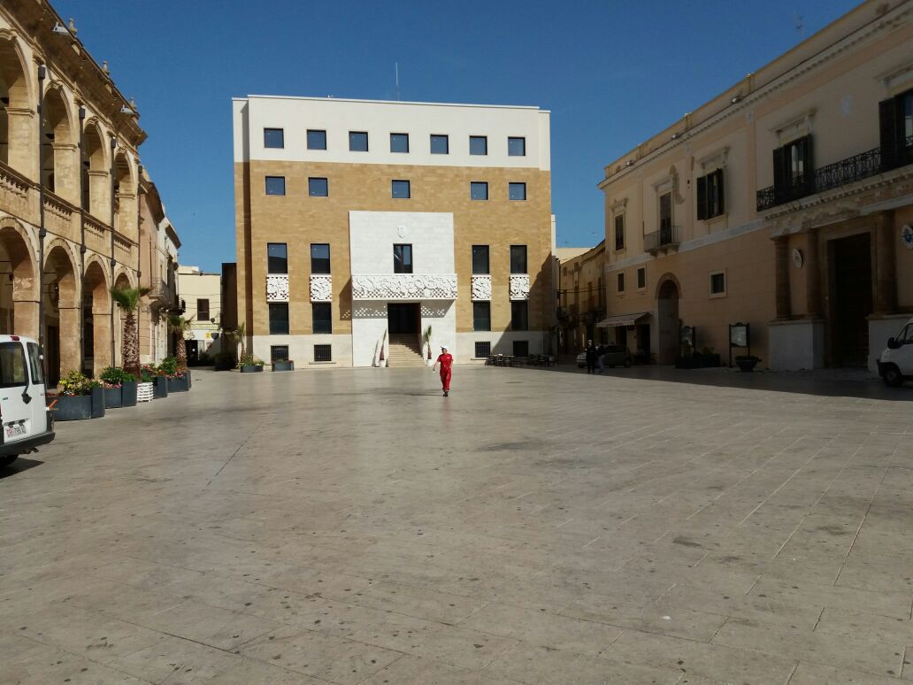 Il palazzo comunale dopo la ristrutturazione, in piazza della Repubblica, Mazara del Vallo, Sicily